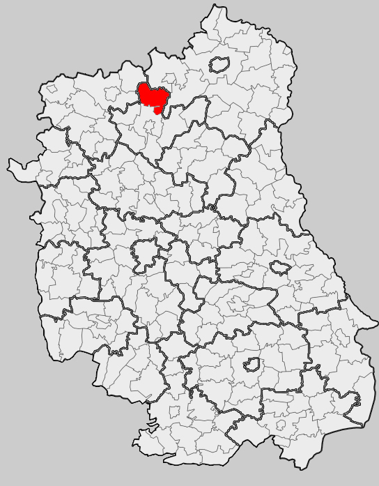 Map of gmina Kąkolewnica, Radzyń Podlaski county, Lublin voivodship Mapa gminy Kąkolewnica, powiat radzyński, województwo lubelskie